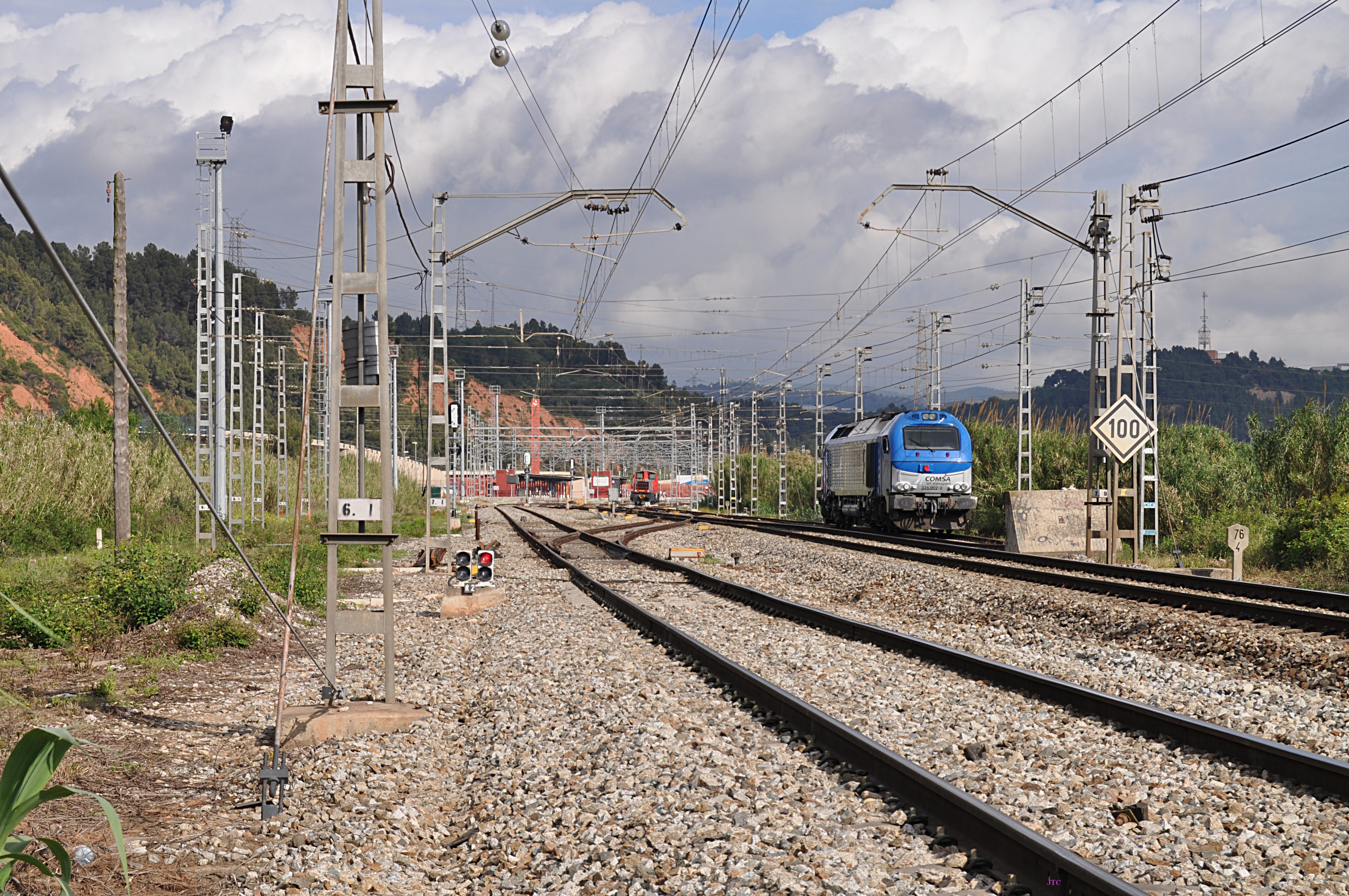 La locomotora diésel-eléctrica locomotora 335.002 de Comsa (Euro 4000 de Vossloh) en la topera de la estación de Castellbisbal.